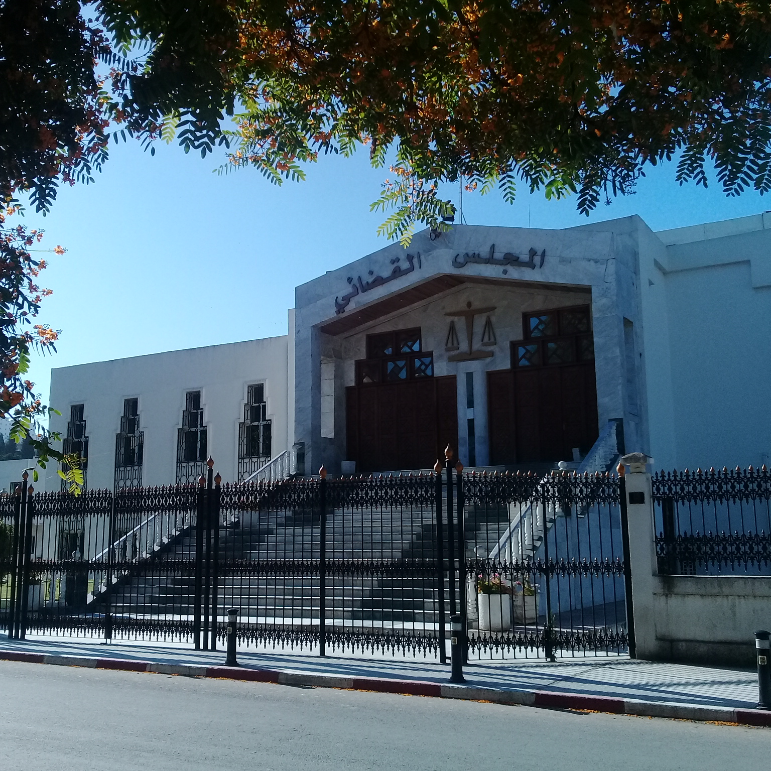 Cour de skikda